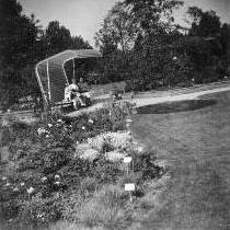 Bundesgartenschau 1957 in Köln - Hausgarten, Detail